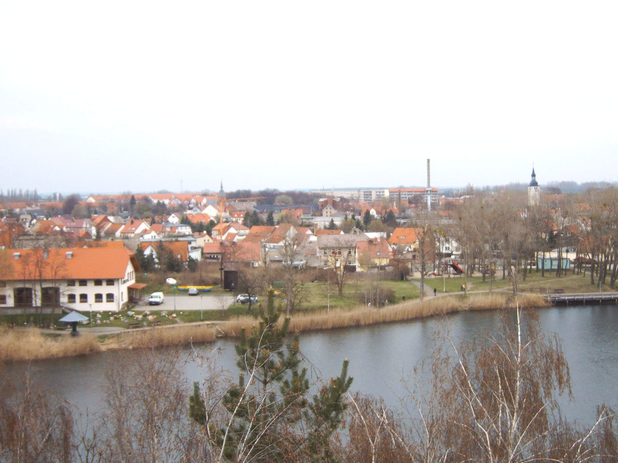 Stadt Gommern in Deutschland, Sachsen-Anhalt Bild aufgenommen am 16.4.2006 Urheber: Olaf Meister